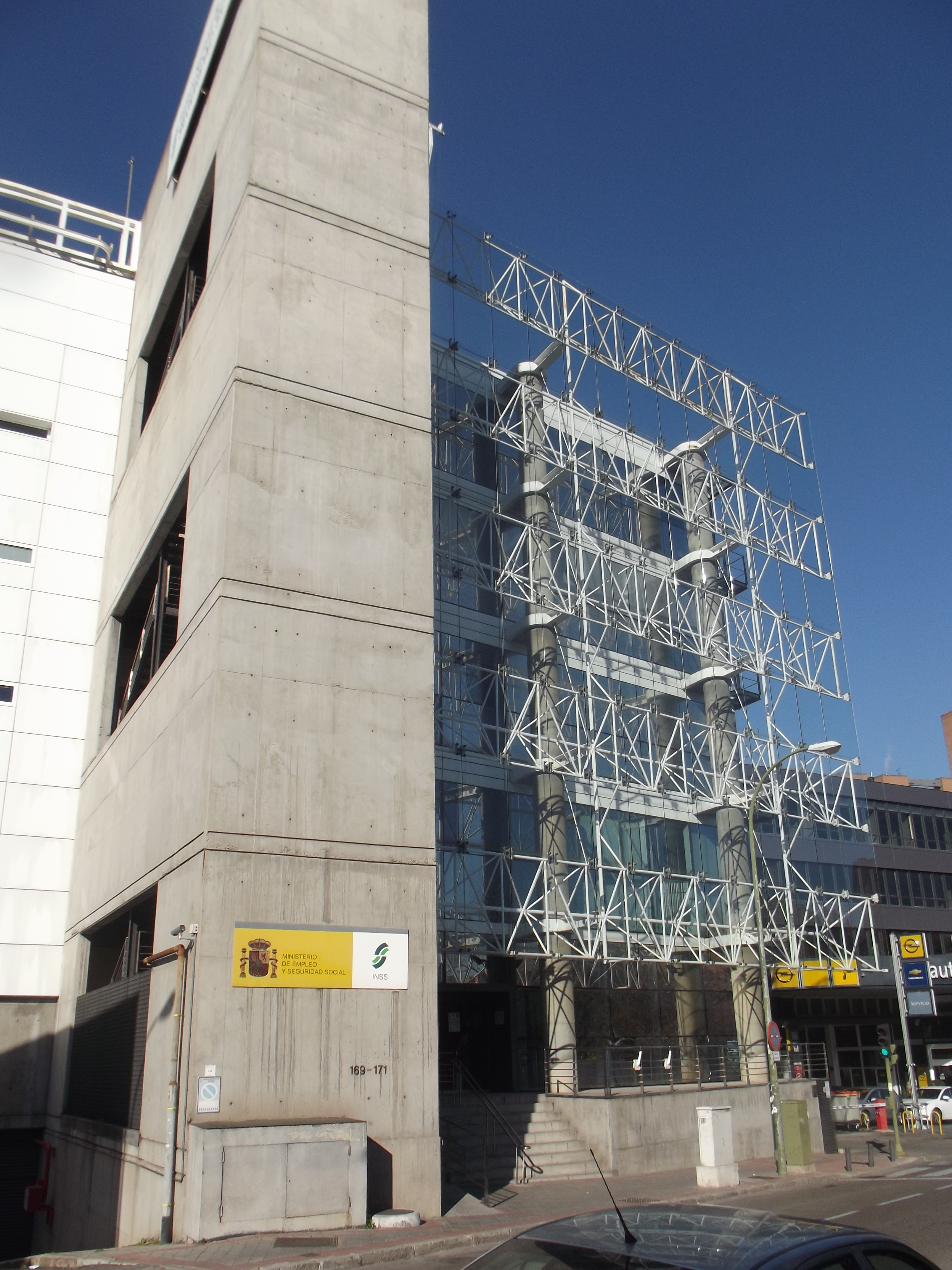 Instituto Nacional de la Seguridad Social, calle López de Hoyos, 169-161, Madrid.